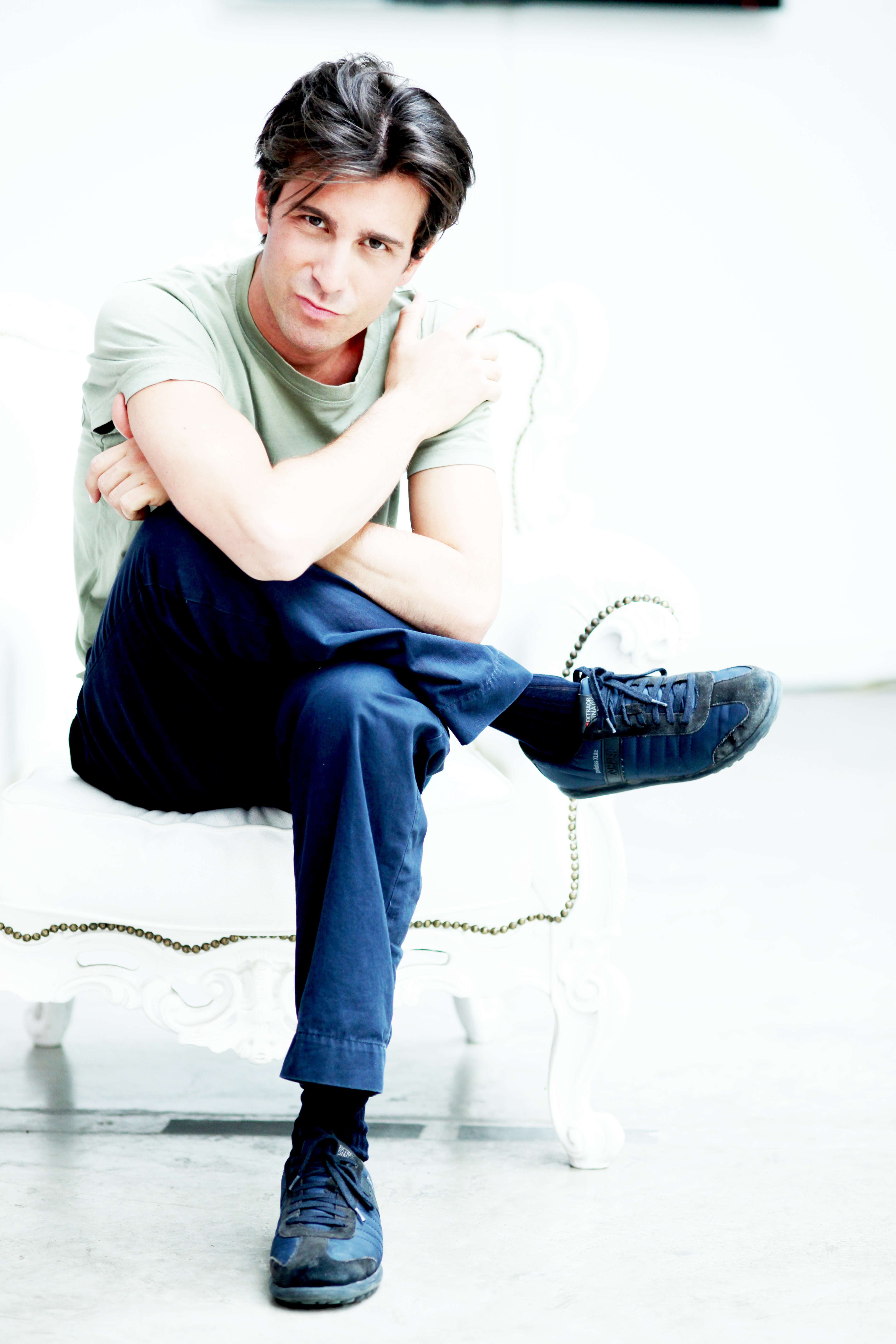 Scrittore e cantautore italiano